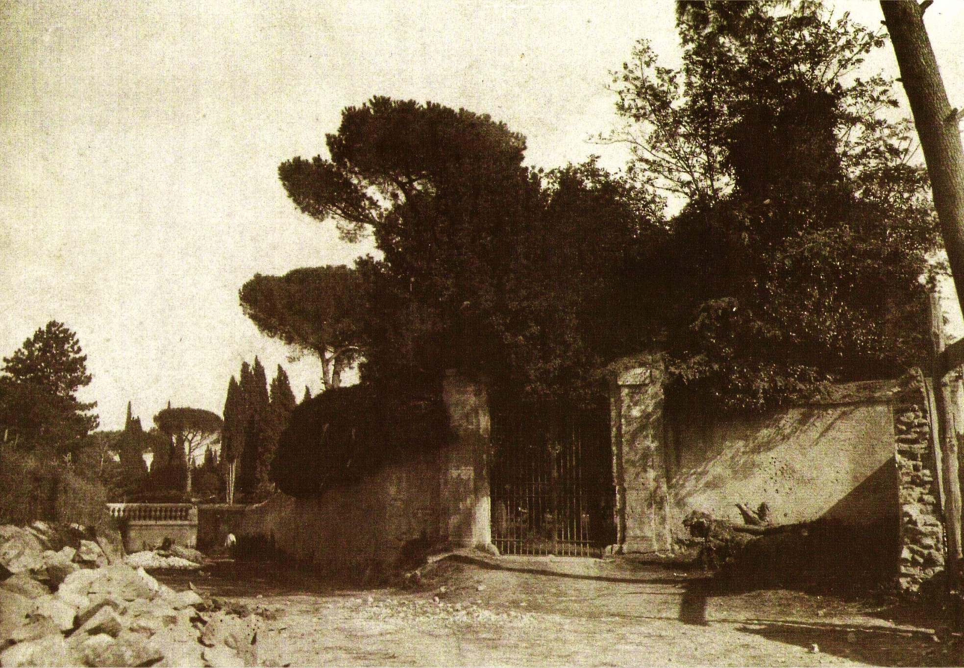 Villa Massimo - Ingresso della Villa Ricotti sul vicolo di Pietralata (ora via G. B. de Rossi). Sulla sinistra della foto si intravede il balaustrato di cinta del villino Crespi e l'inizio della via G. A. Guattani. Sulla destra si vede il cancello della Villa Ricotti, che immetteva in una strada privata circondata da cipressi. La via correva dritta fino a raggiungere il casino padronale e corrisponde all'attuale via di Villa Ricotti.